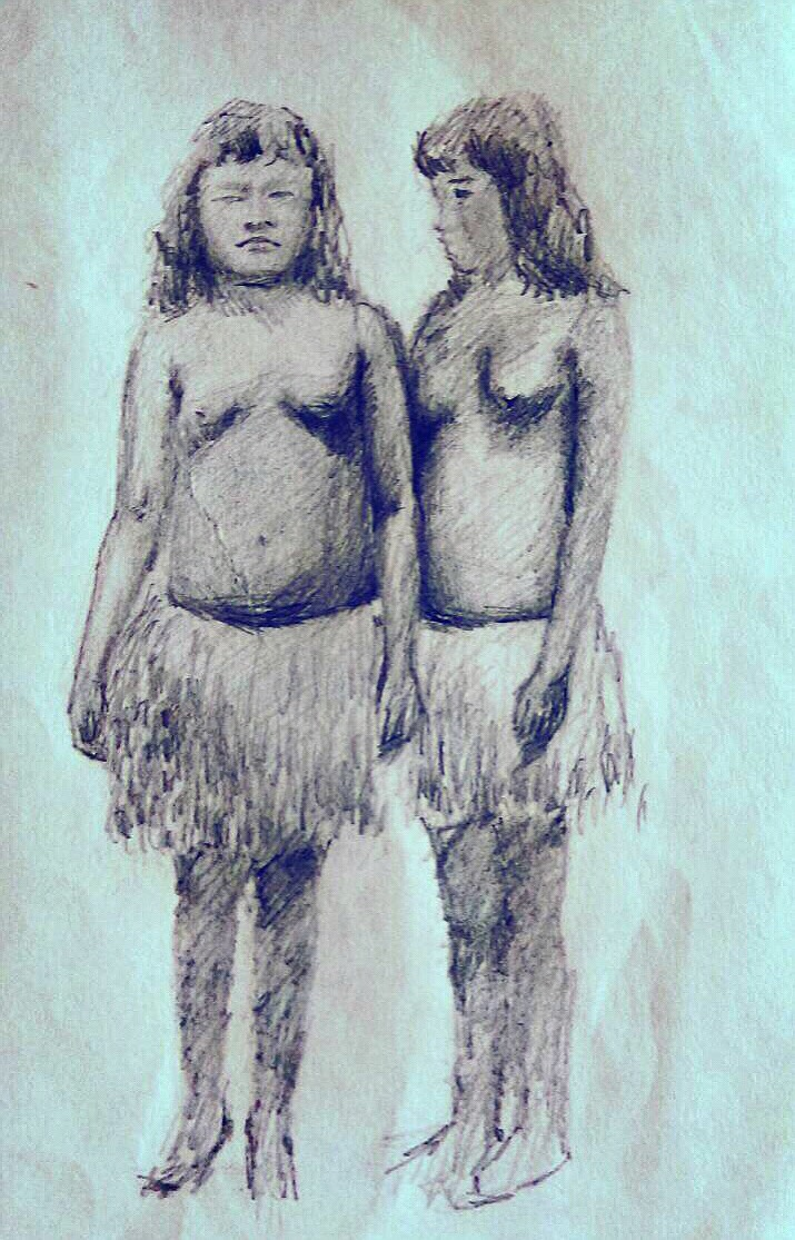 中文（台灣）: 吉里巴斯女孩 周律卉畫